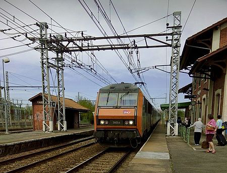 Intercités 3631 Paris Austerlitz-Cerbère en gare de Caussade 2015